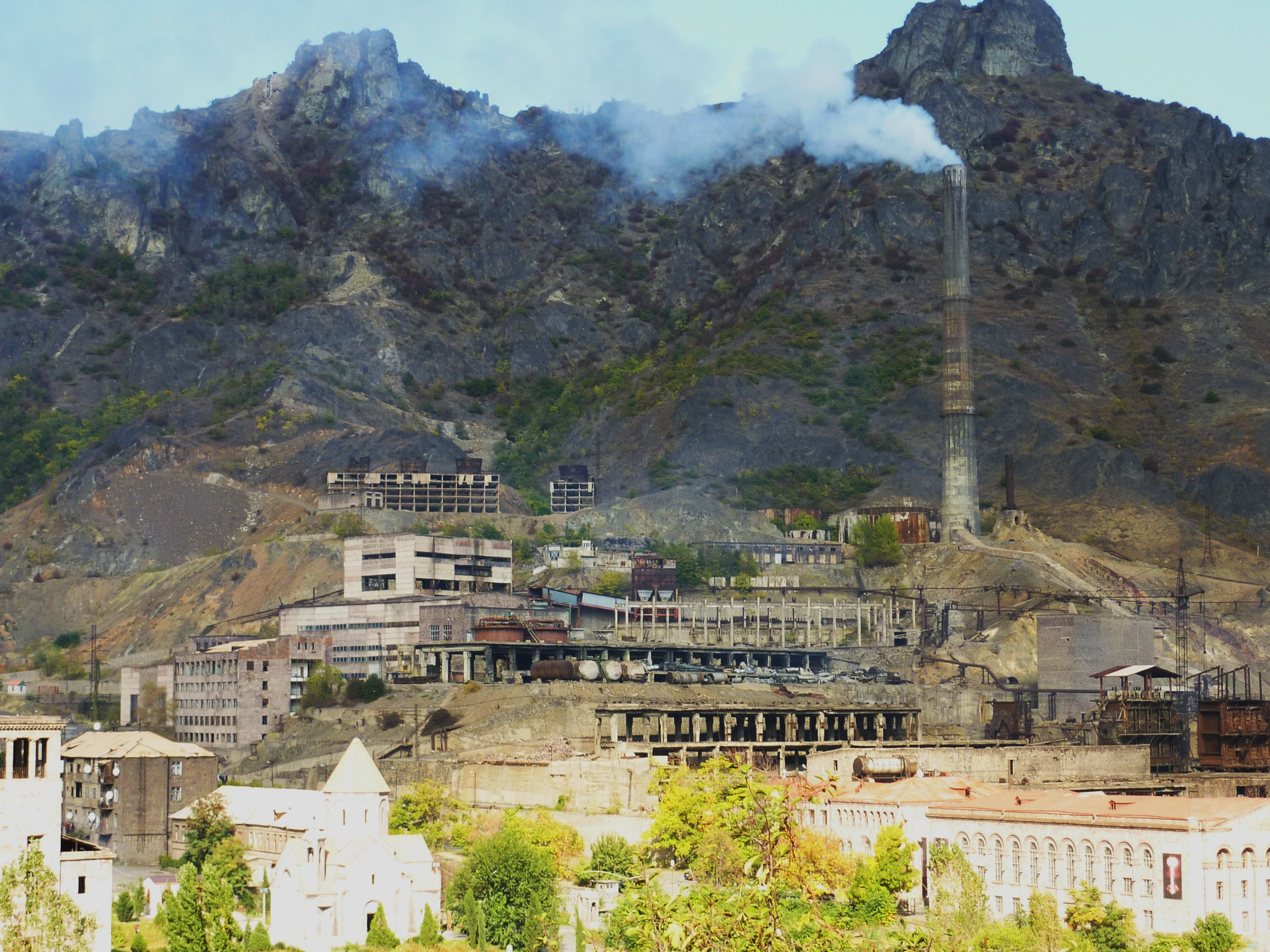 Alaverdi : la principale usine d'Arménie